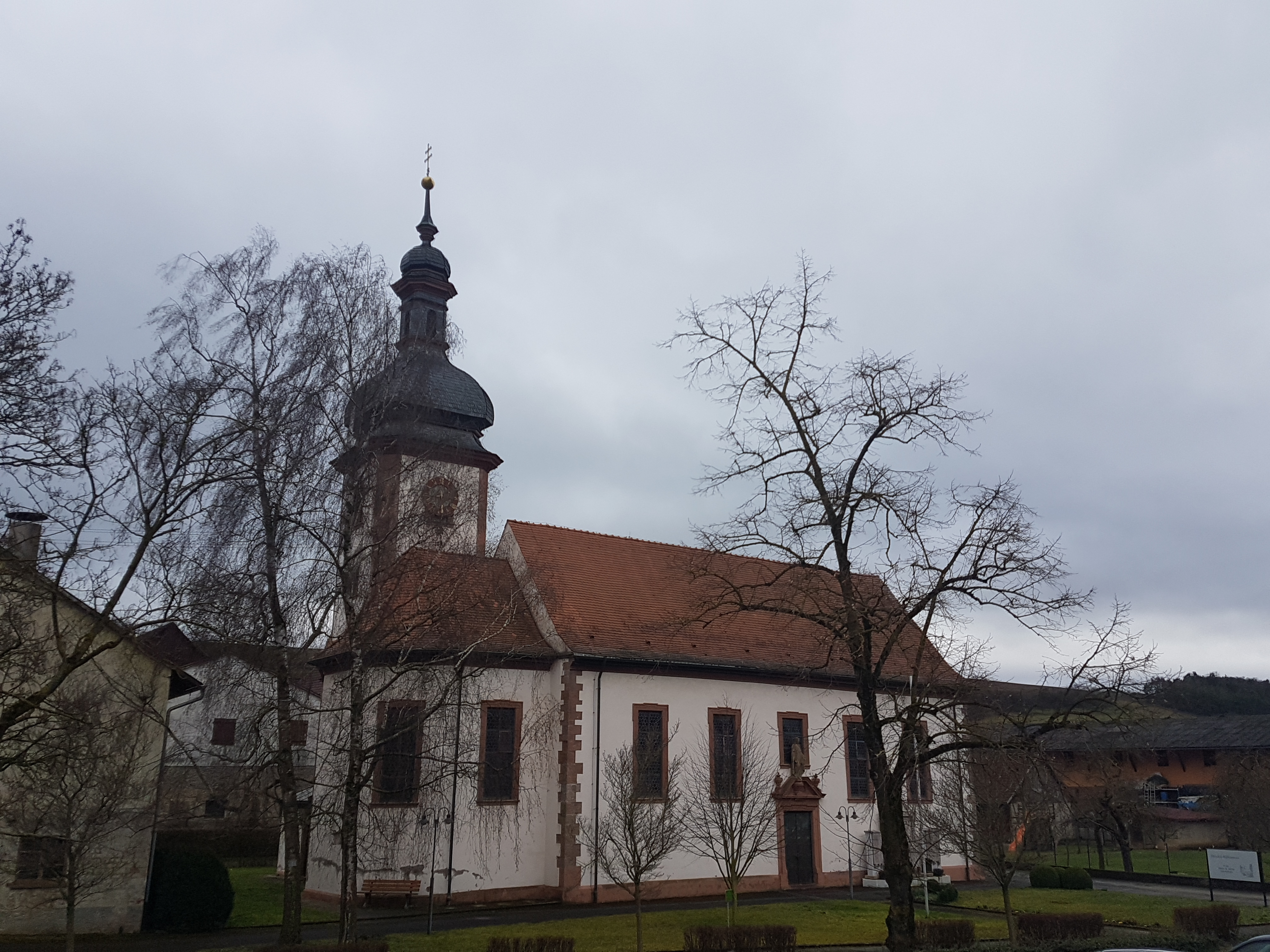 St. Georg in Oberbalbach, Außenansicht Der Ort Oberbalbach im Hintergrund